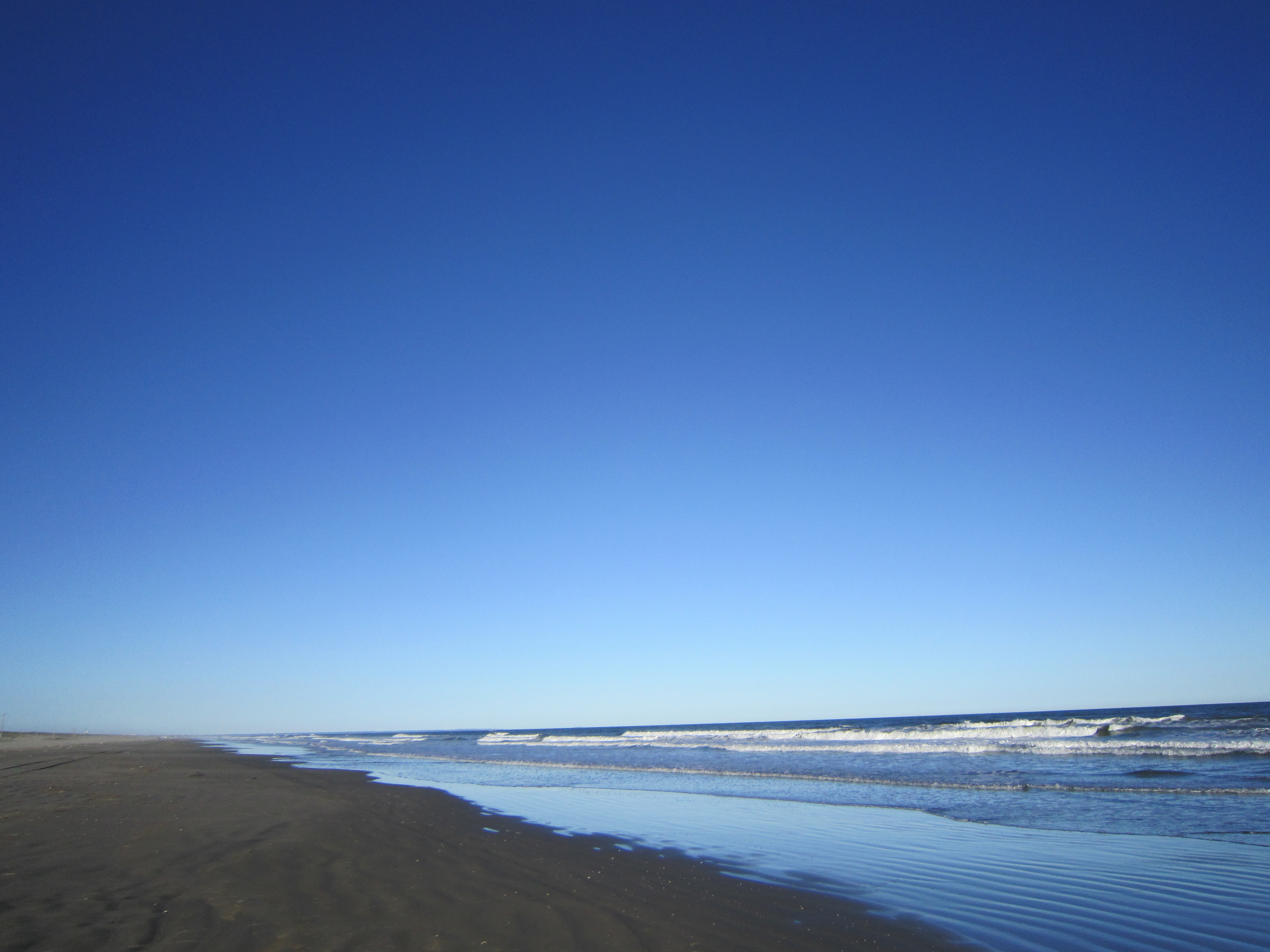 蓮沼海浜公園付近（九十九里浜、山武市）